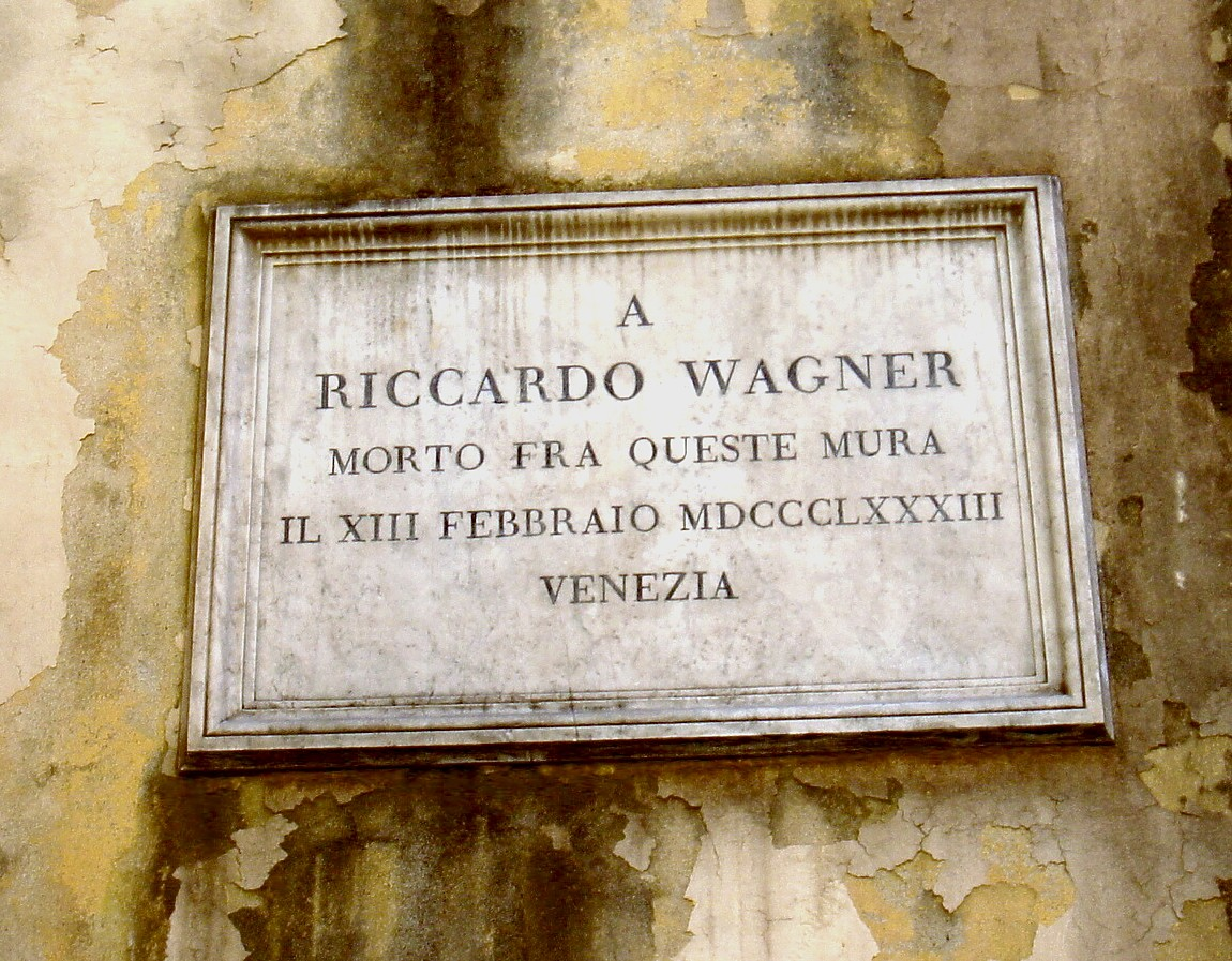 Venezia: Ca' Vendramin Calergi, muro posteriore, lapide in memoria della qui avvenuta morte di Richard Wagner, nel 1883.